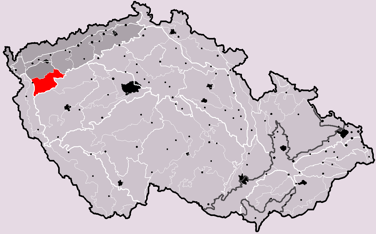 Poloha geomorfologického celku Tepelská vrchovina v rámci České republiky. Hercynský systém Hercynská pohoří I Česká vysočina I3 (III) Krušnohorská subprovincie I3C (IIIC) Karlovarská vrchovina I3C-1 (IIIC-1) Tepelská vrchovina